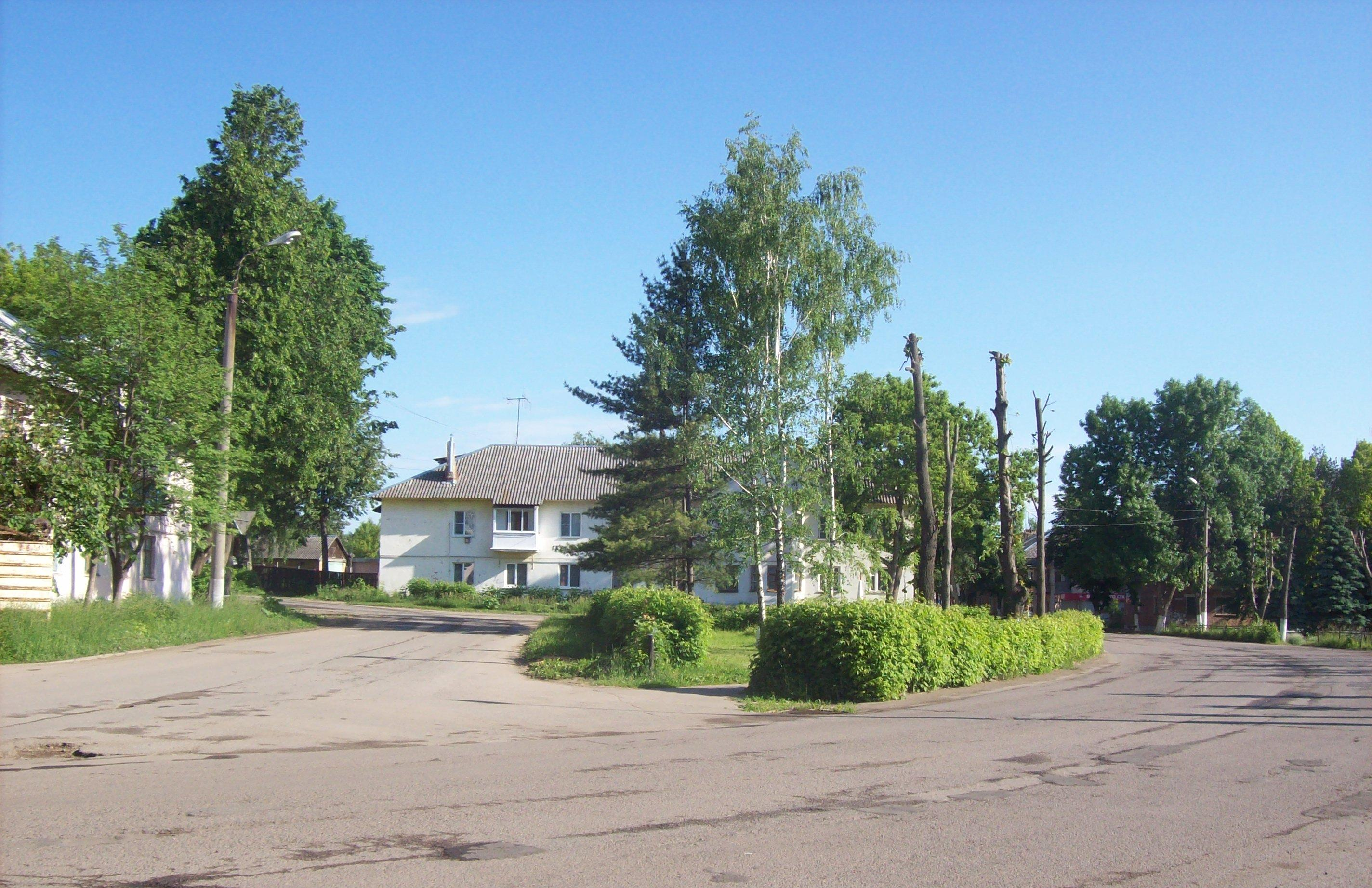 Тульская область. г.Богородицк. Вид города